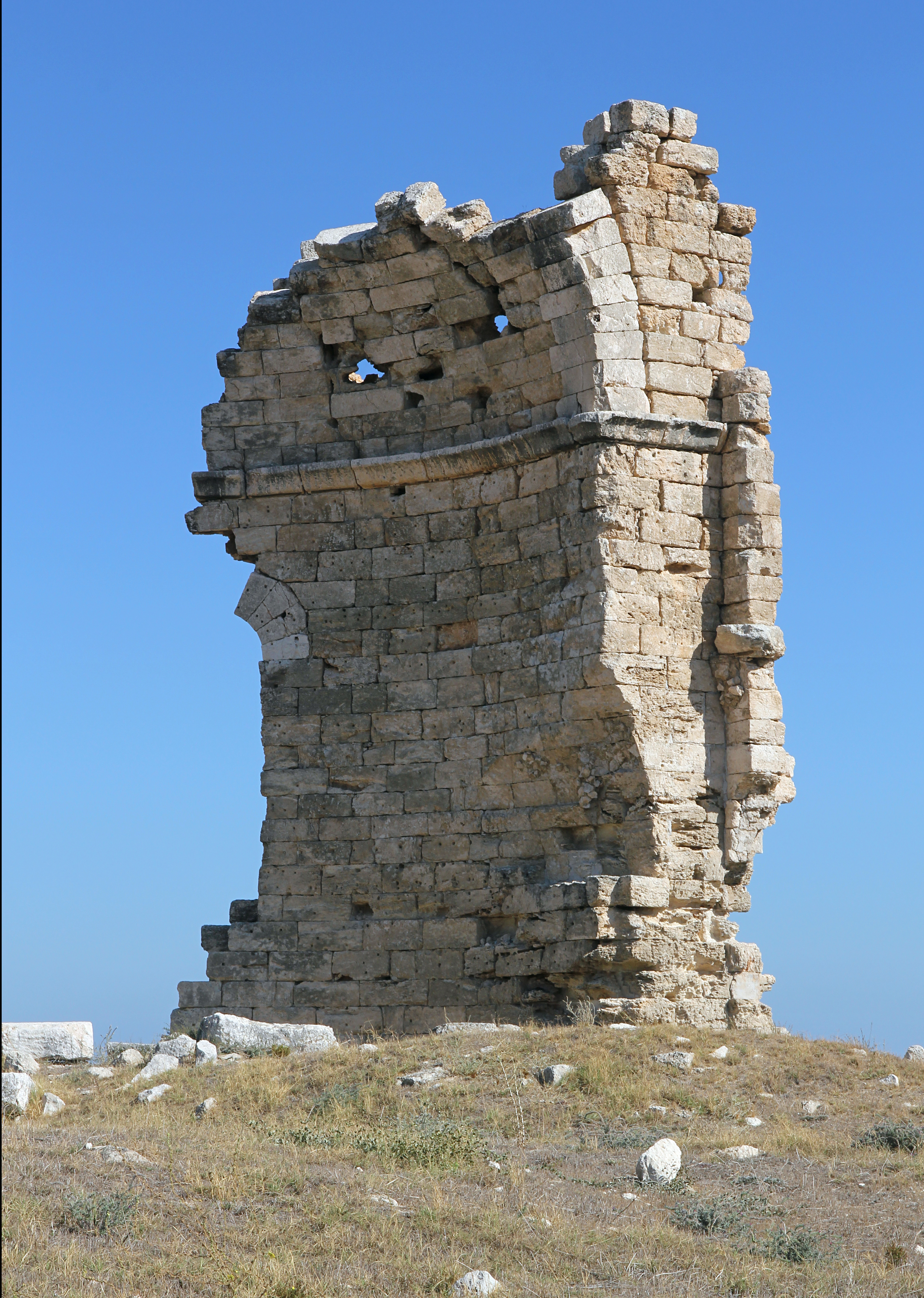 Ayathekla, Pilgerstätte der Hl. Thekla in Silifke, Südtürkei, Rest der Basilika